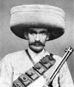 El general Zapatista Trinidad Paniagua.